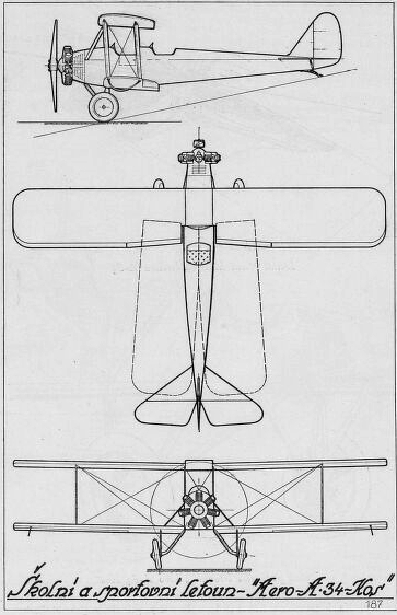 Letoun Aero A-34 Kos (dispozice)